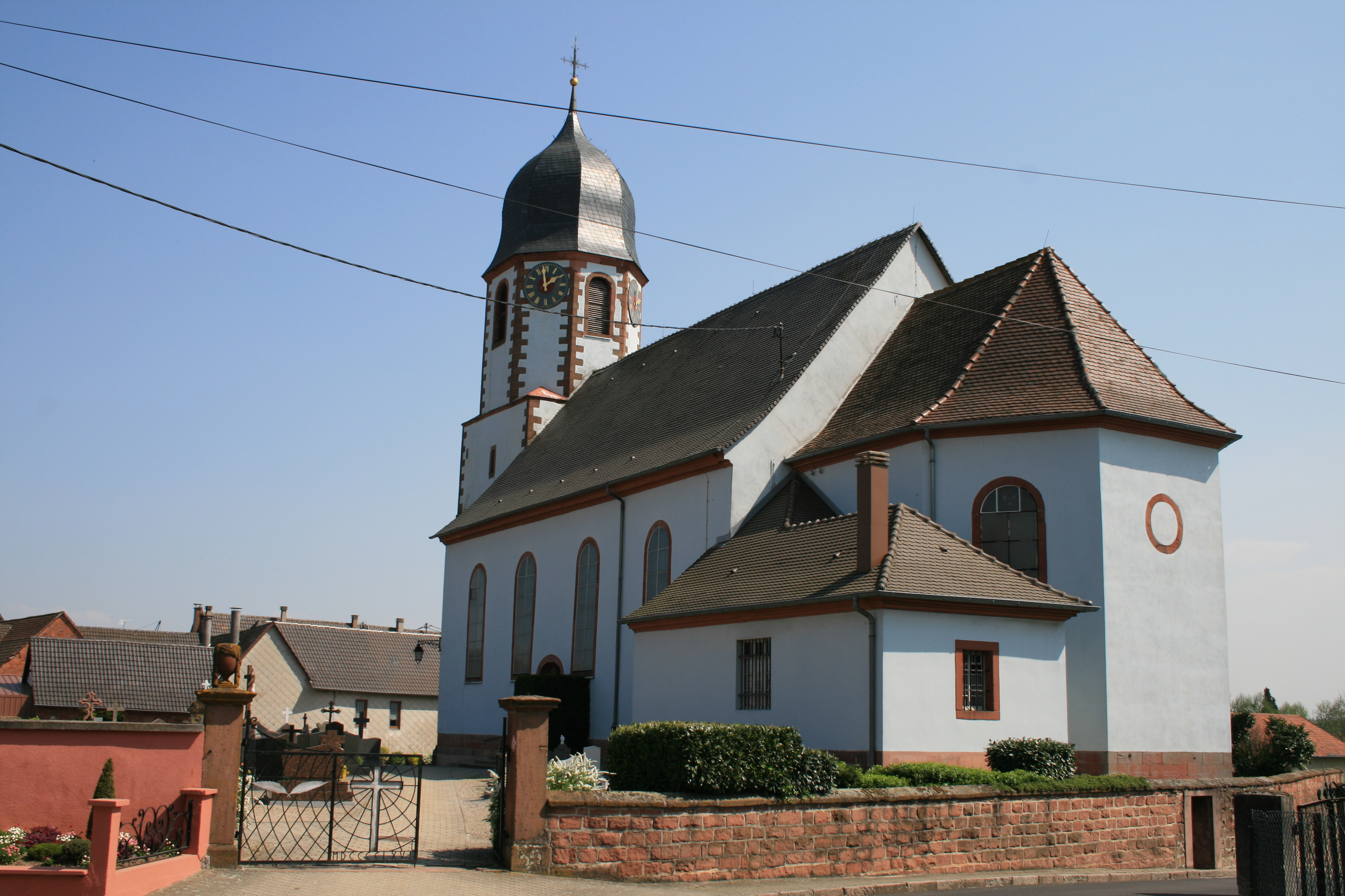 Eglise de Niederlauterbach, Alsace